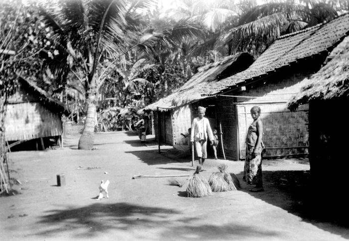 Negatief. Een man en een vrouw in een kampong te Dampar, Oost-Java